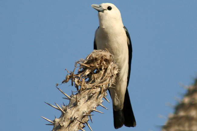 Artamie à tête blanche